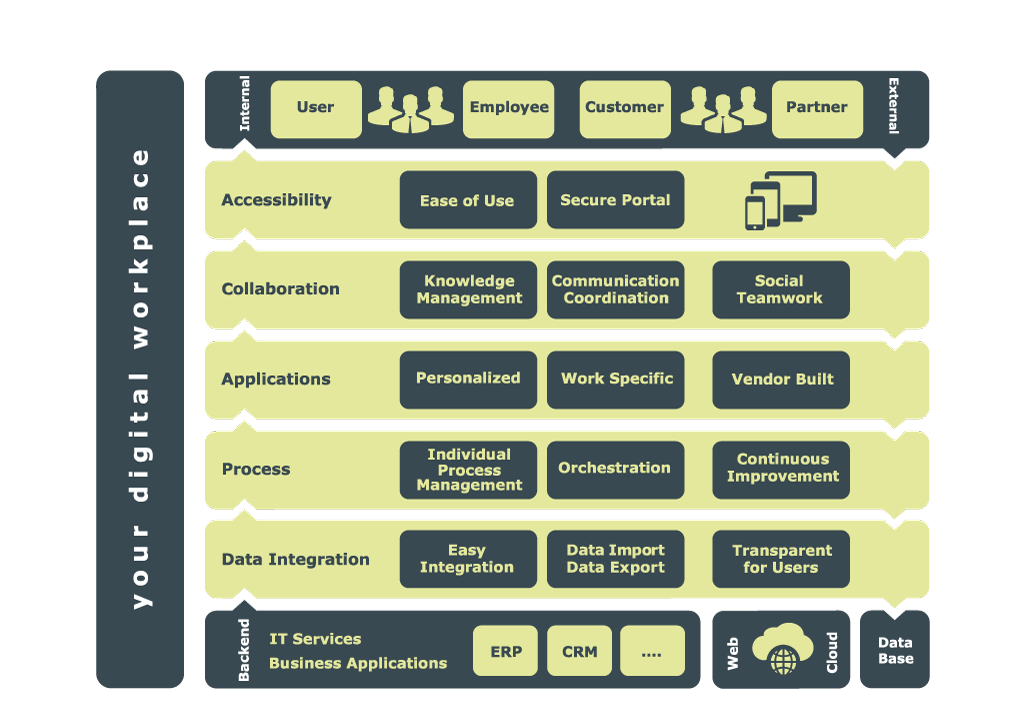 Mobilität Datenintegration Applikationen Social Collaboration Prozessoptimierung